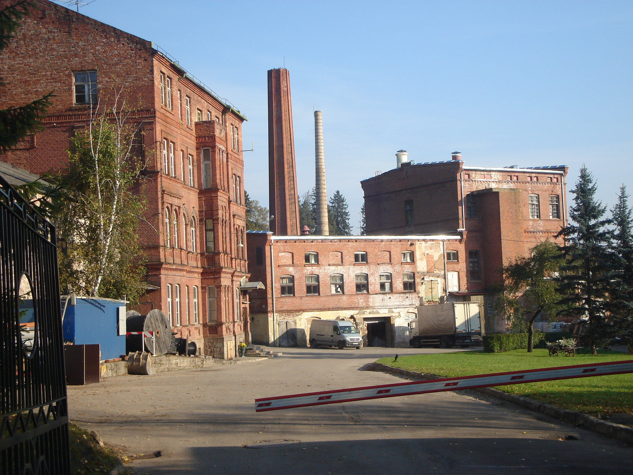 Līgatnes papīrfabrika